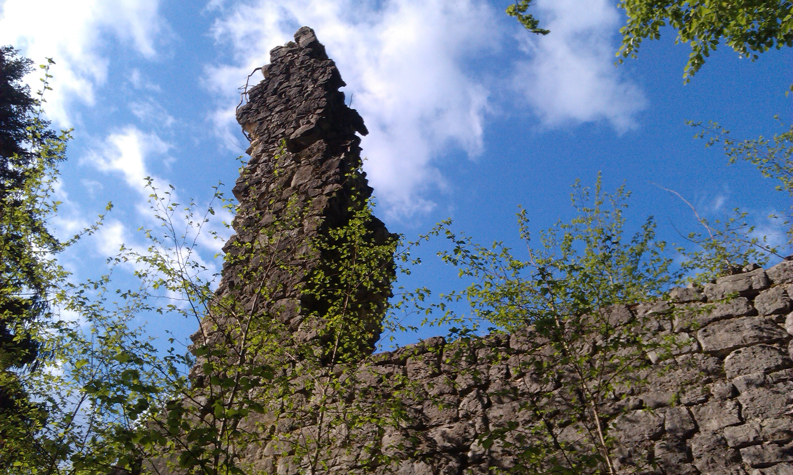 Grad Stara Soteska 01